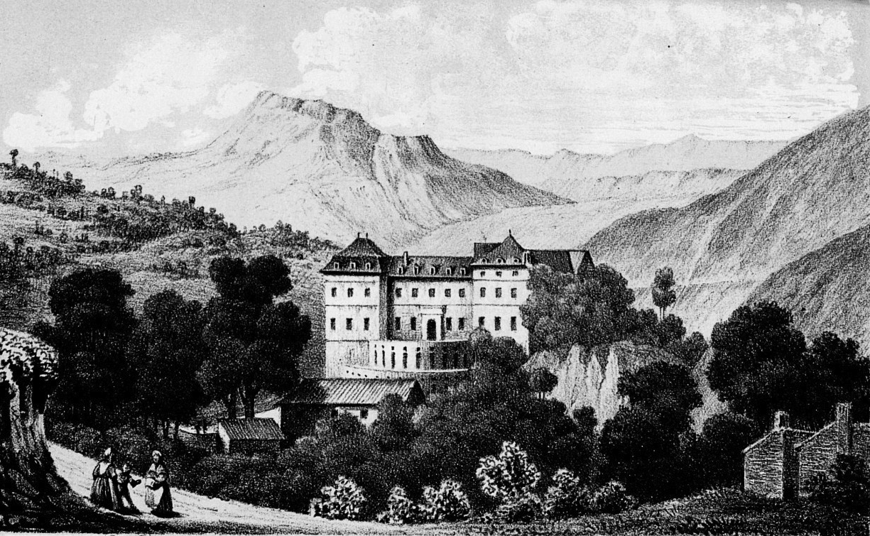 La-Motte-les-bains